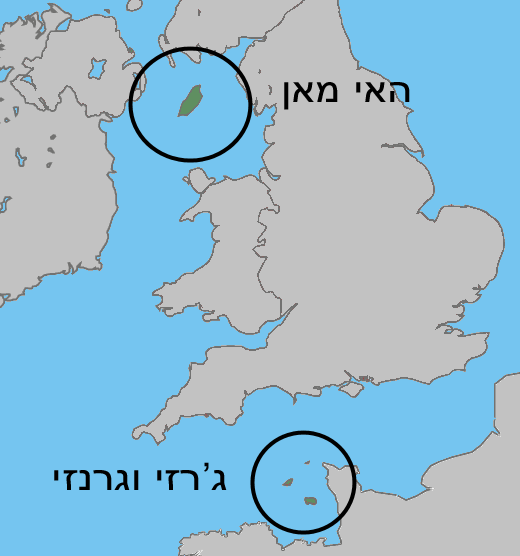 Image of the Crown Dependencies שטחי חסות של הכתר הבריטי